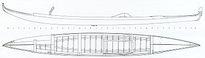 Disegno schematico di un gondolino